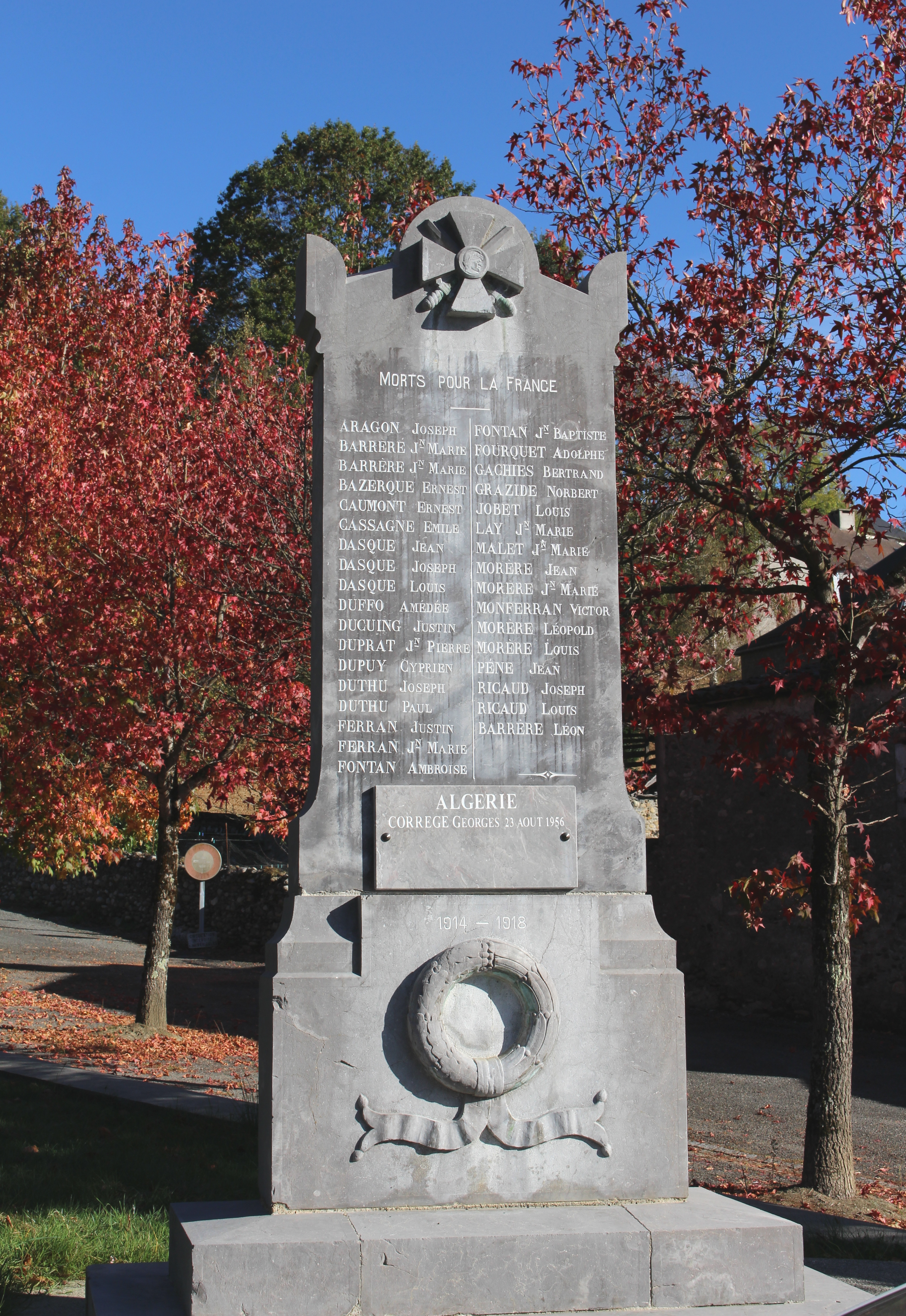 Monument aux morts de Tuzaguet (Hautes-Pyrénées)